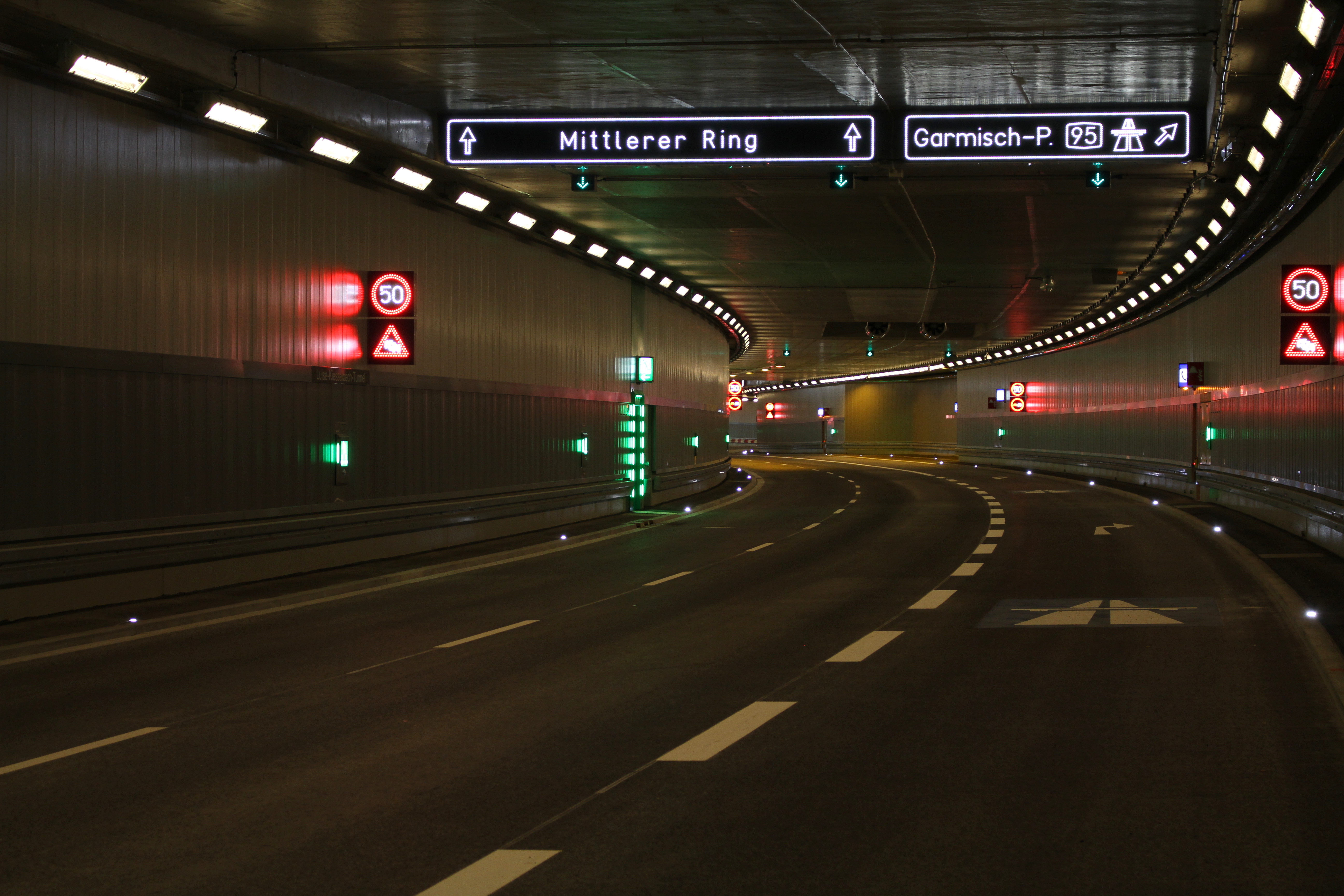 Luise-Kiesselbach-Tunnel des Mittleren Rings